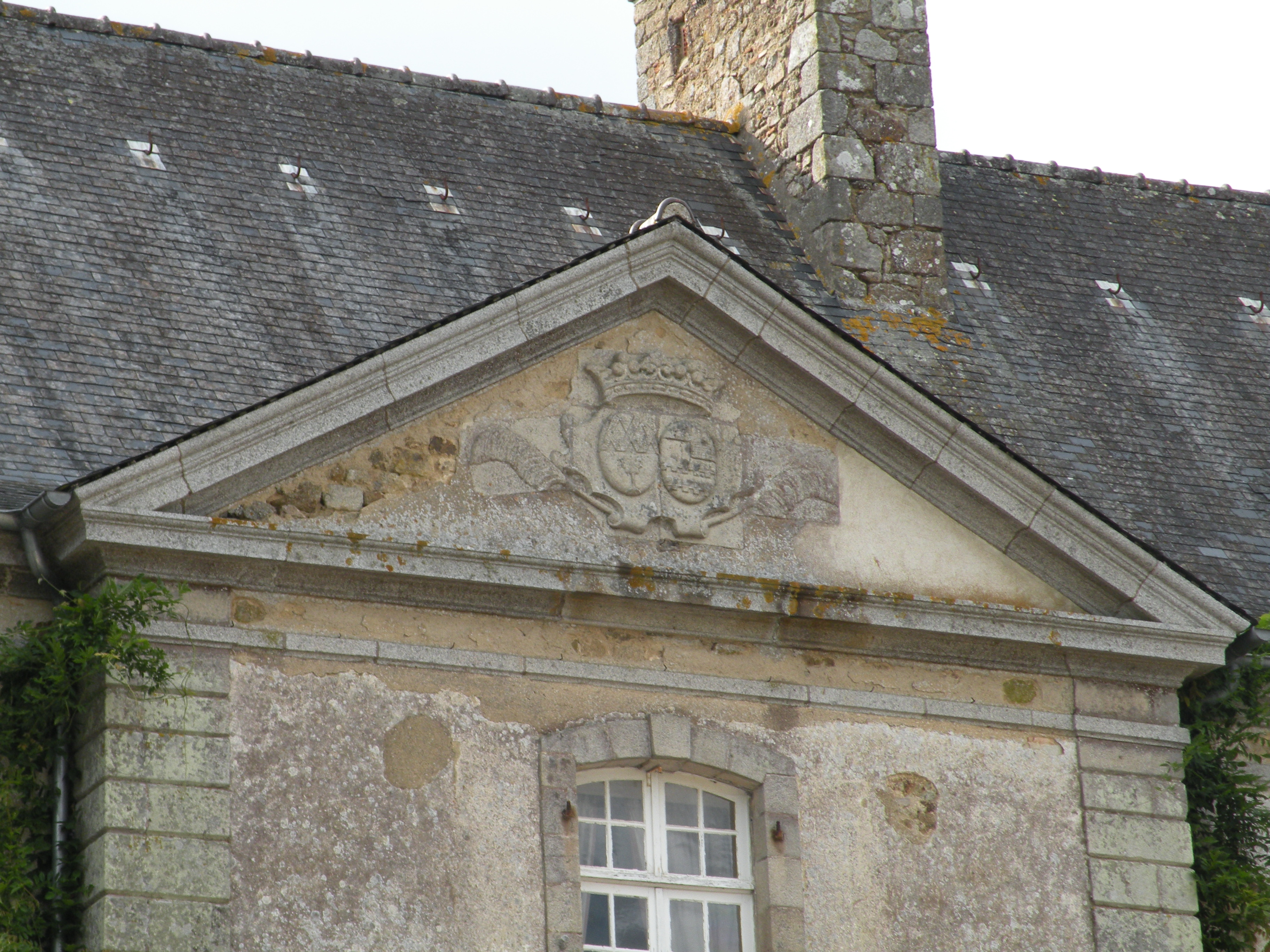 Le château de Montmuran aux Iffs.